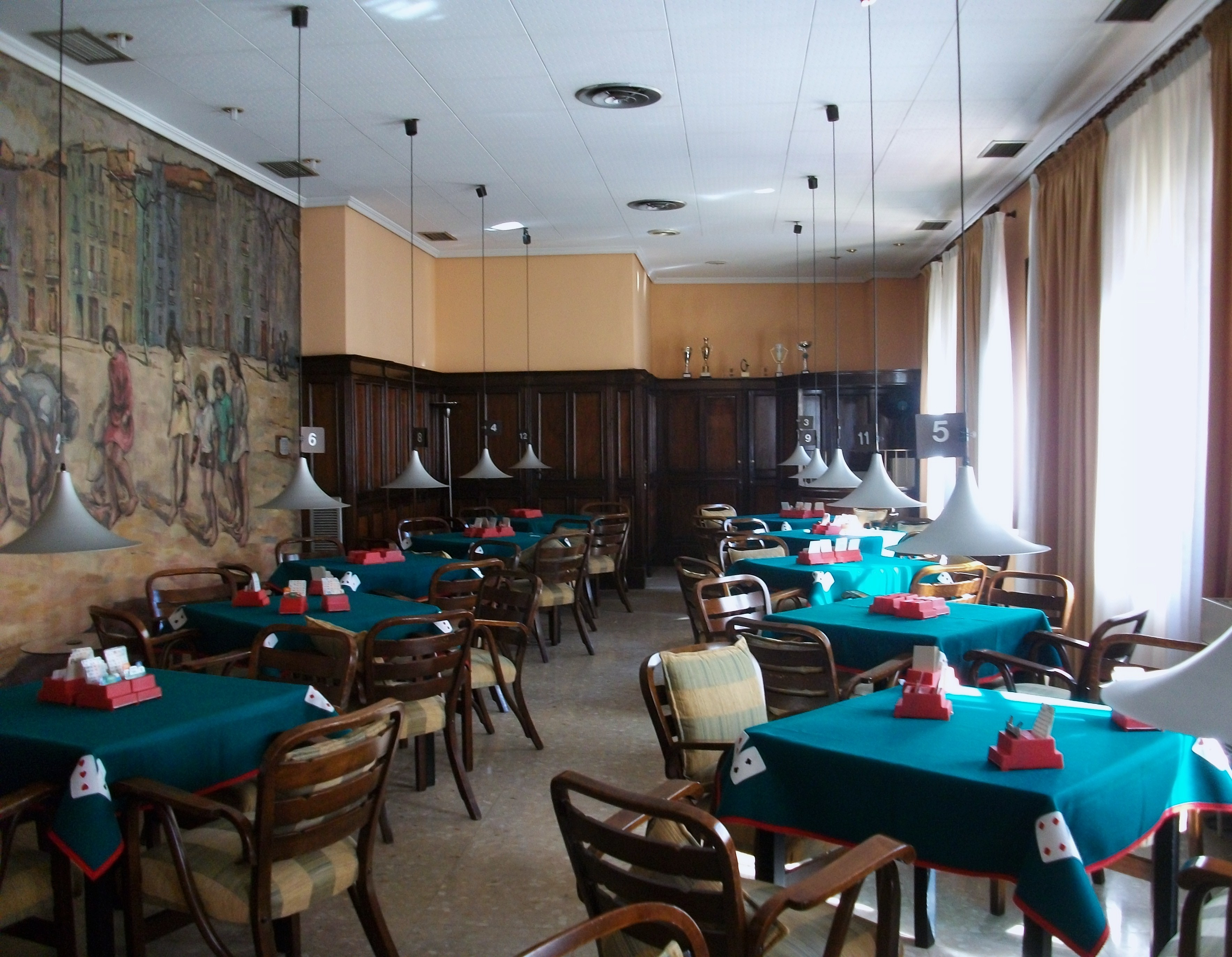 Sala de jocs per a dones, Casino Antic de Castelló de la Plana.